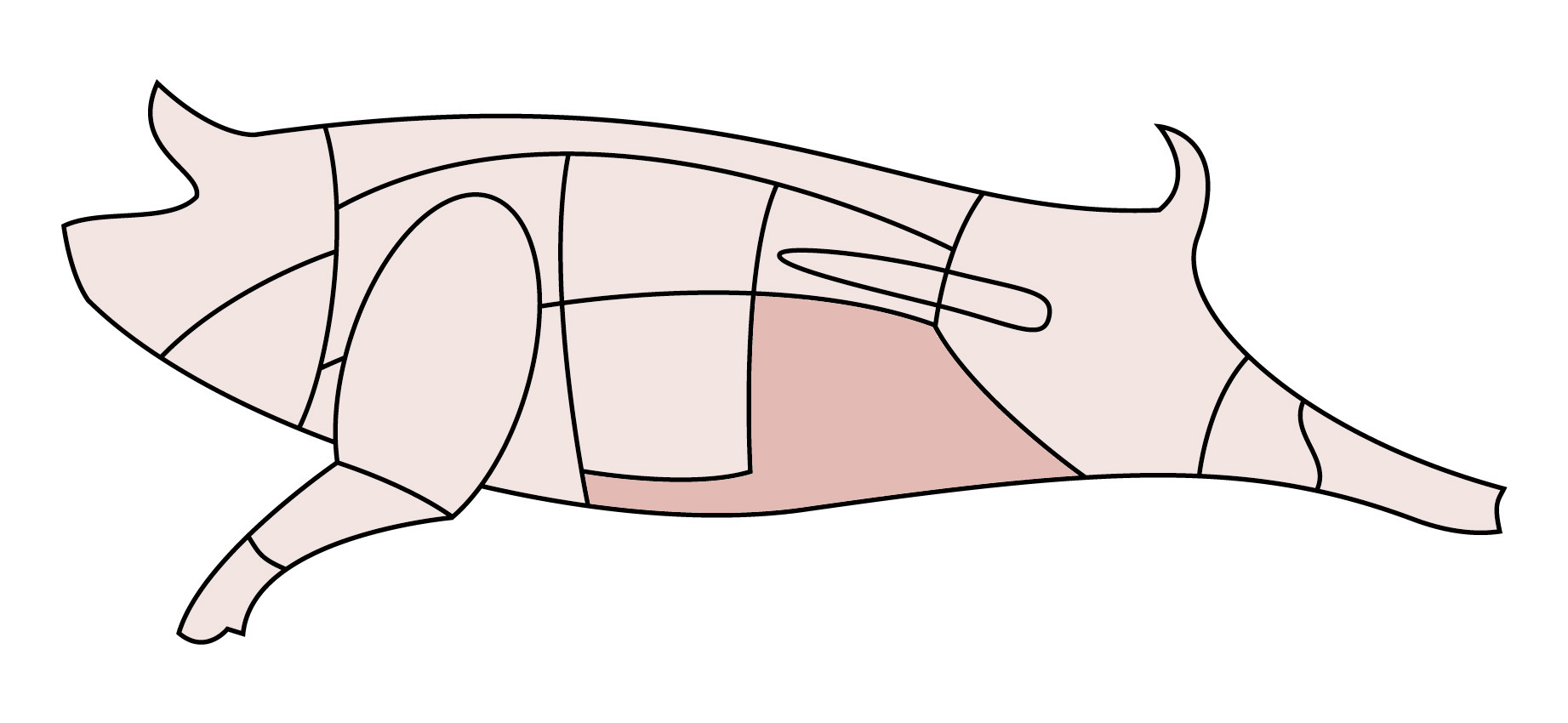 Schematische Darstellung eines Schweins, Bauchlappen.